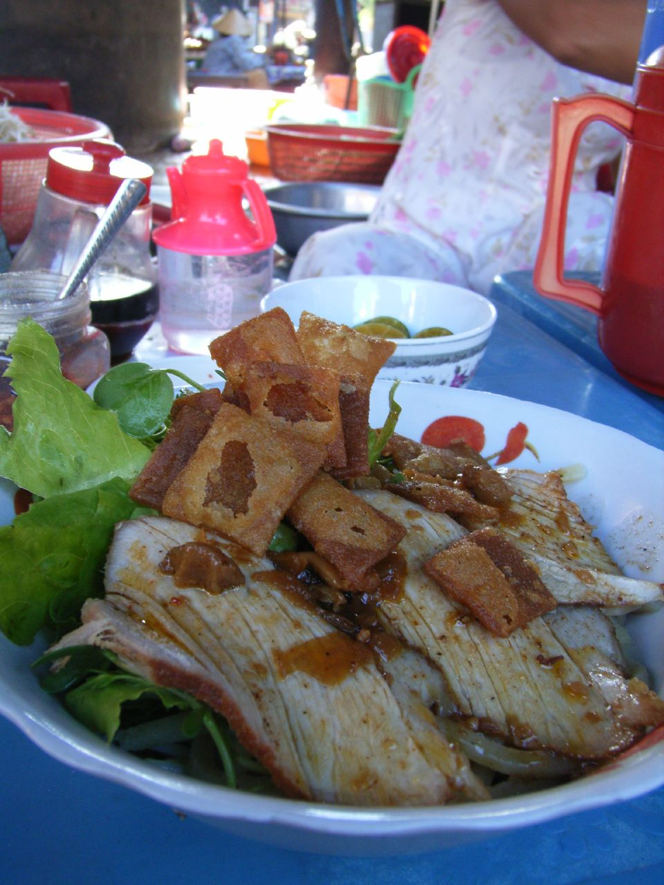 この市場前のカウラウは苦手な苦い香草も無く、八角も無く、とっても美味しかった。